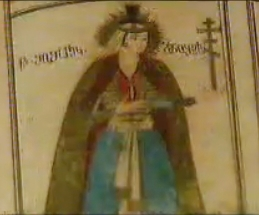 "წმინდანთა კრებული" ილუსტრაცია. საქართველოს საზოგადოებრივი მაუწყებლის რეპორტაჟი.